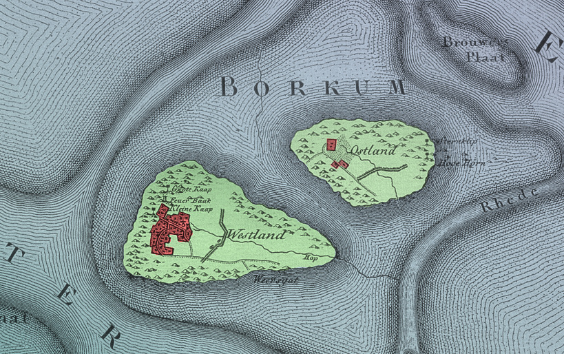 Zeichnung von Borkum, 1805 angefertigt; Stich von Le Coq um 1805